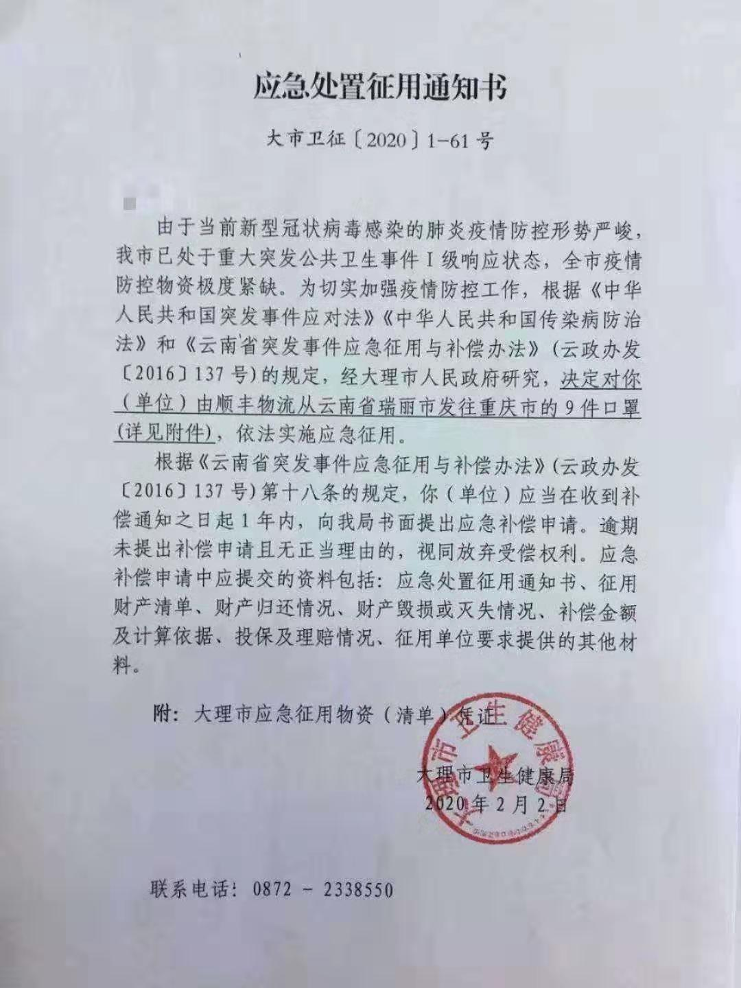 中文（中国大陆）: 大理市应急处置征用通知书。来自经济观察网。